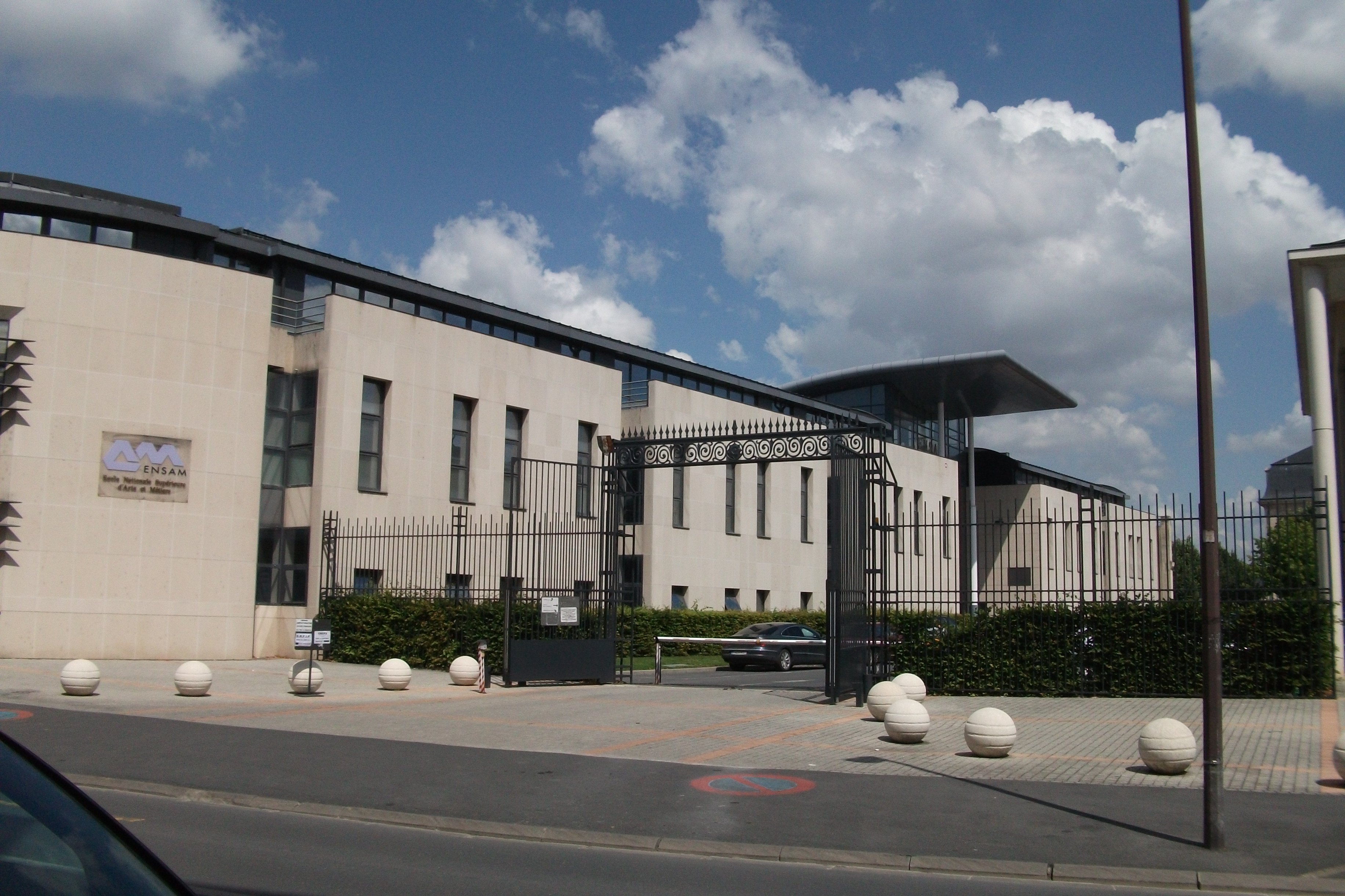 vue de l'École Nationale Supérieure d'Arts et Métiers (Châlons-en-Champagne).